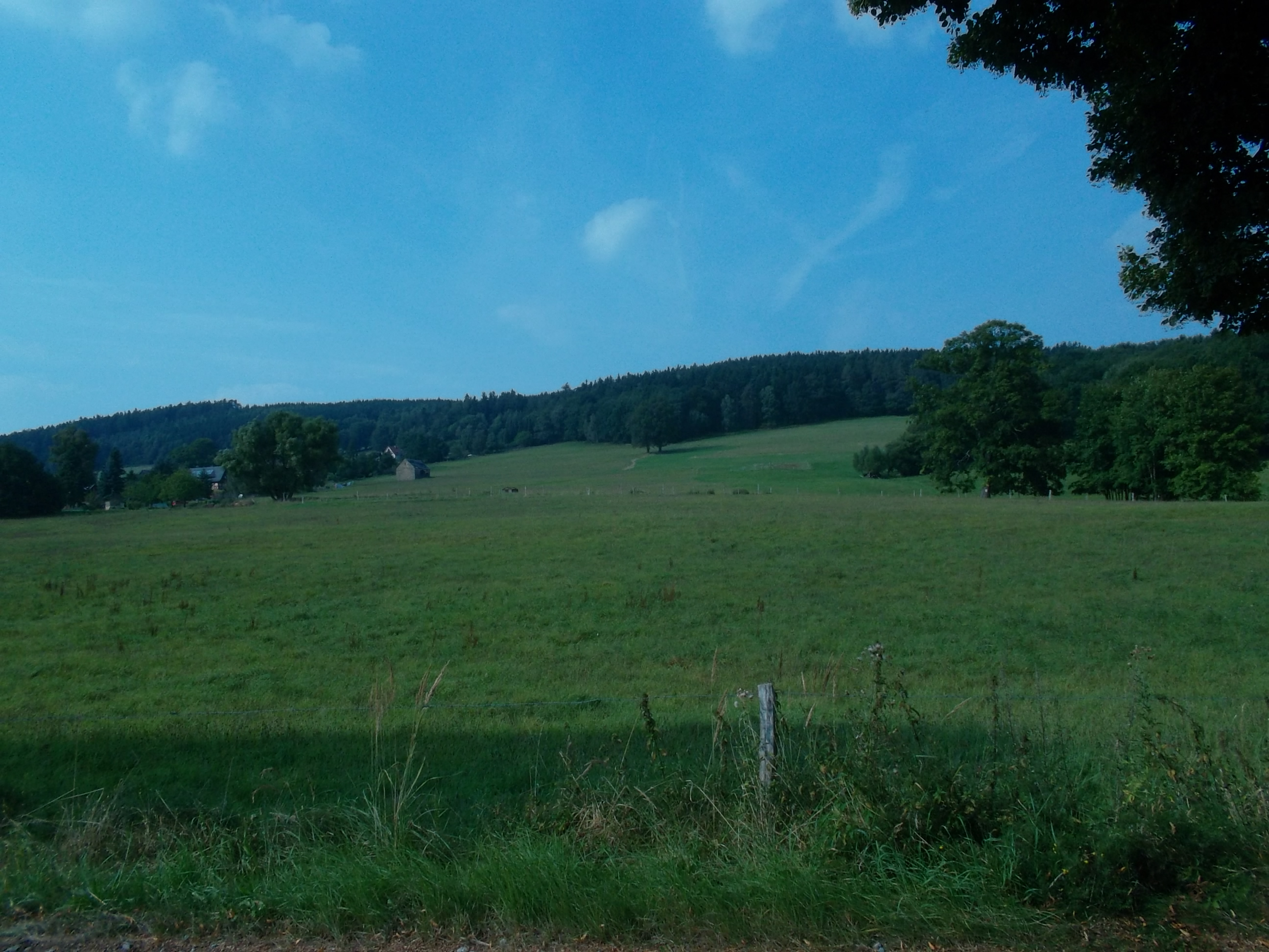 Wiesenhang östlich von Irgersdorf